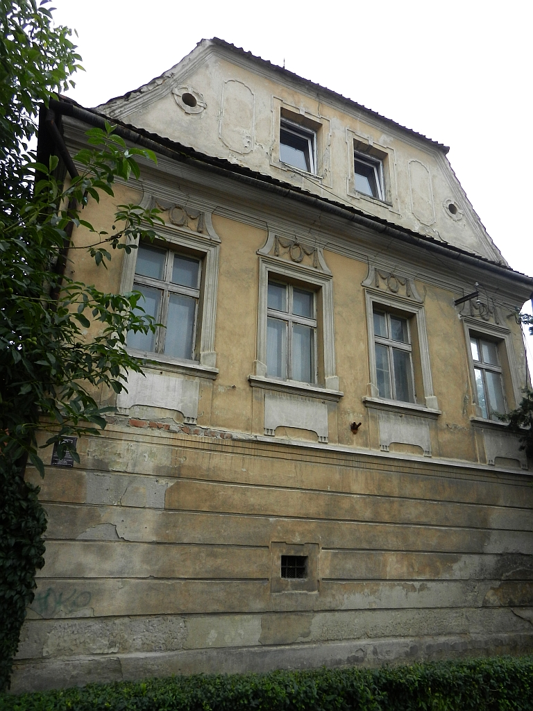 Casa Nicolae Ciurcu